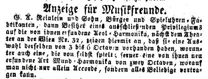 Anzeige in der Wiener Zeitung von 25.09.1828 Mundharmonika mit 2 Oktaven